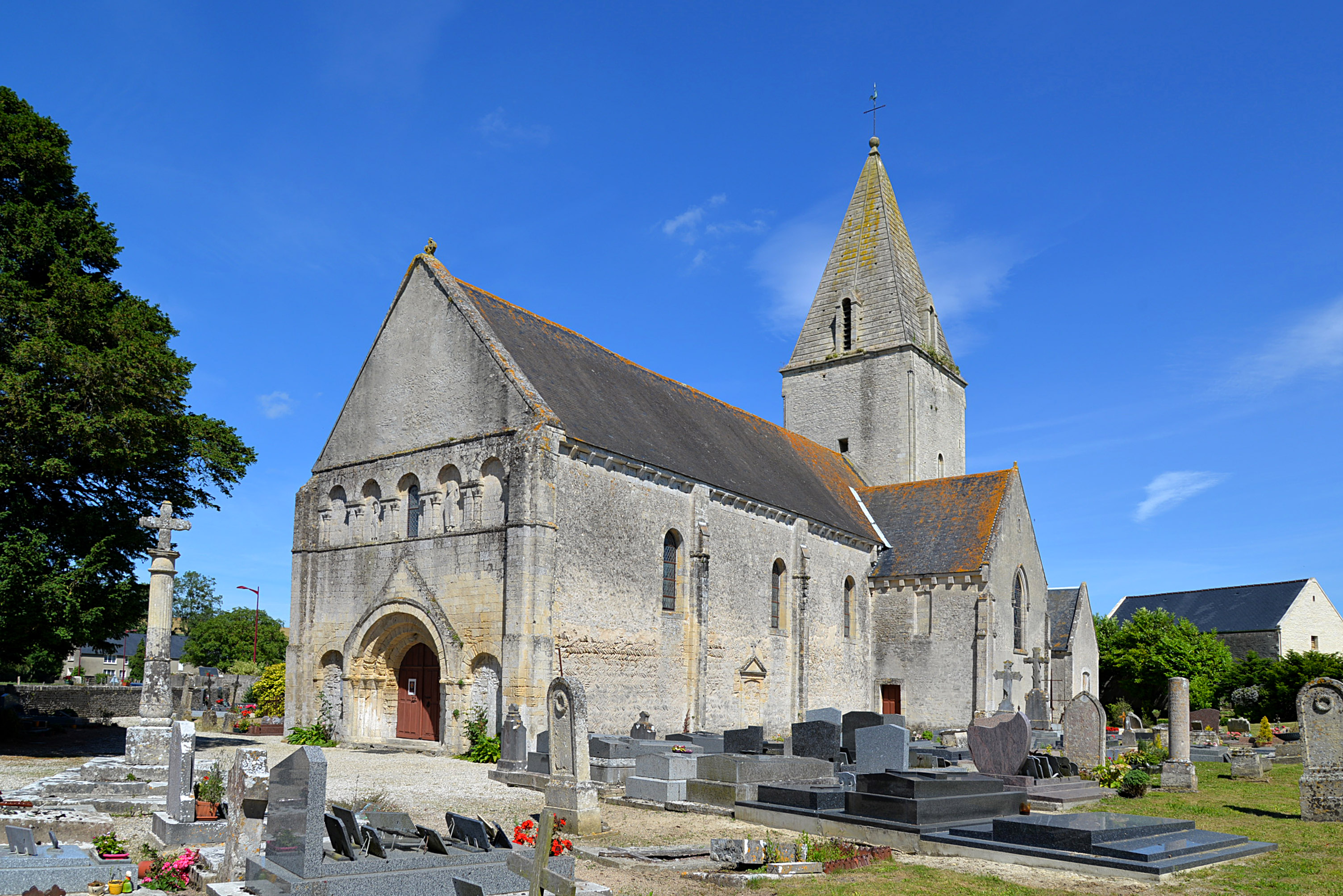 Meuvaines (Calvados)